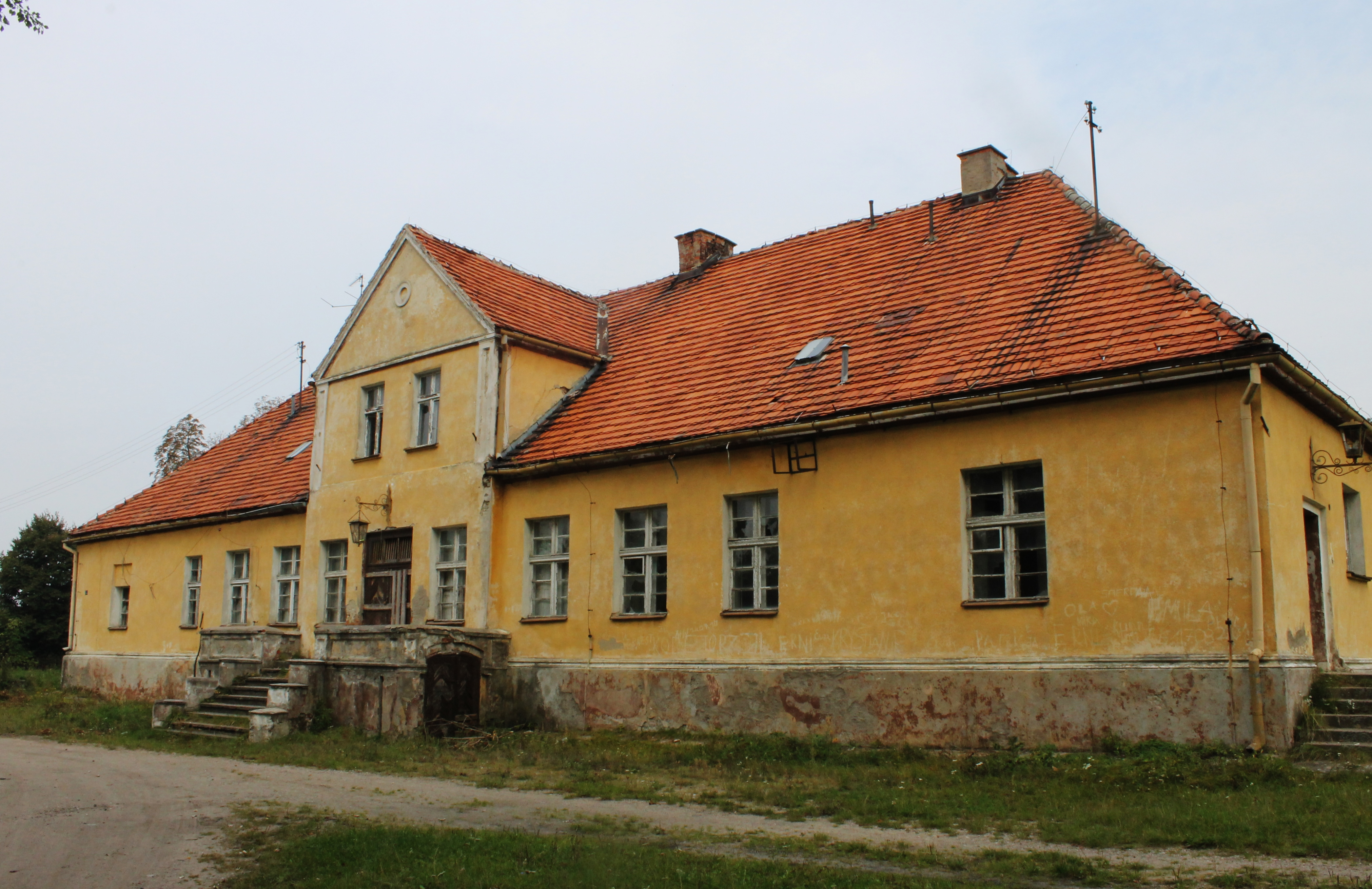 Smogulecka Wieś, zespół dworski